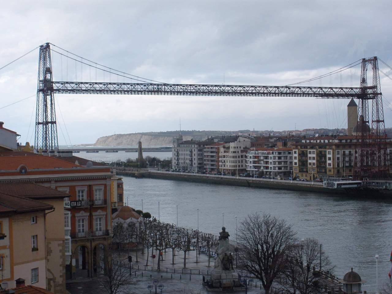 Transporter bridge of Biscay